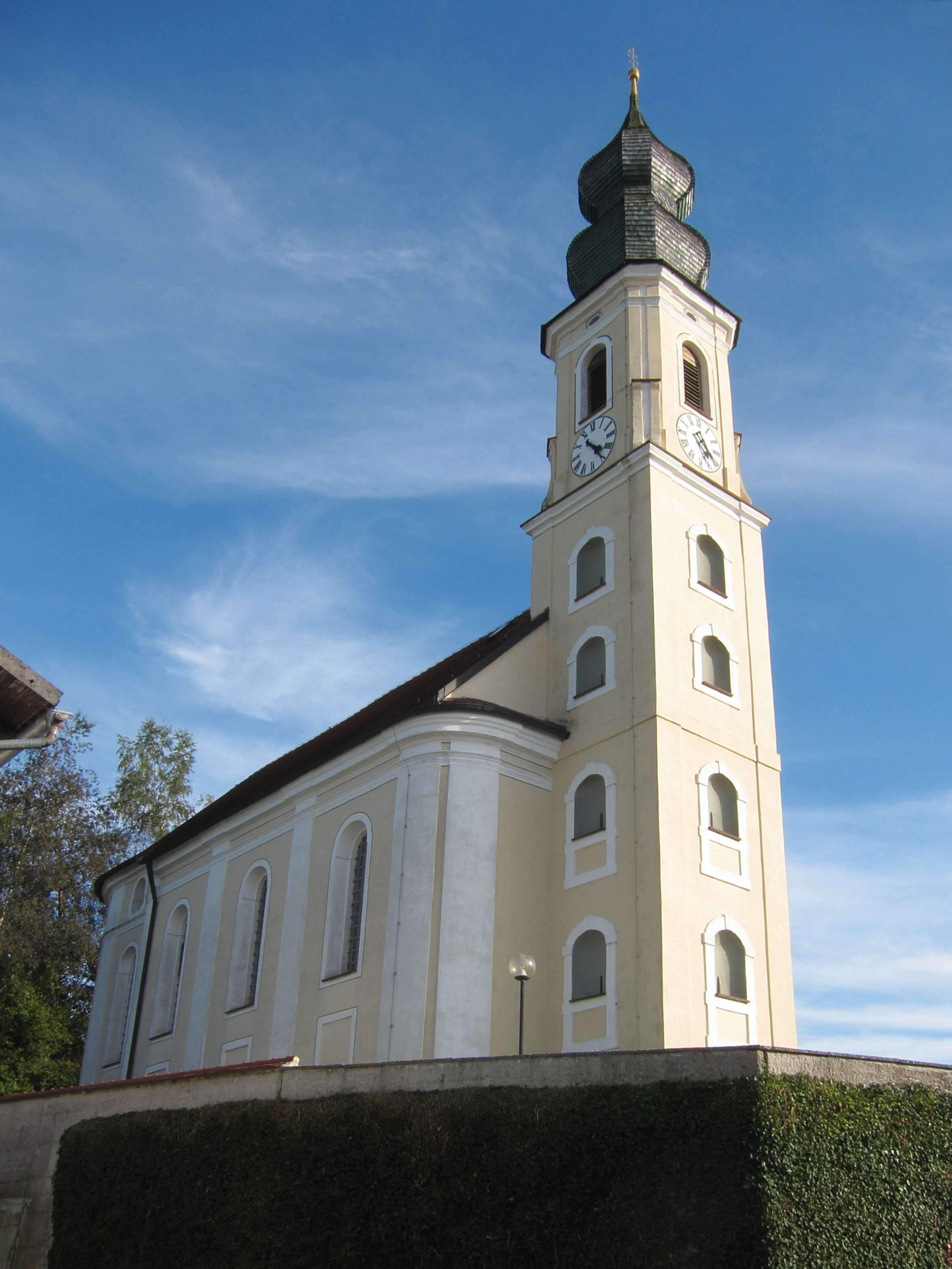 Hofstarring; katholische Filialkirche St. Laurentius, barocke Saalkirche mit eingezogener Apsis und Spindelhelmturm, von Johann Baptist Lethner, 1767; mit Ausstattung.